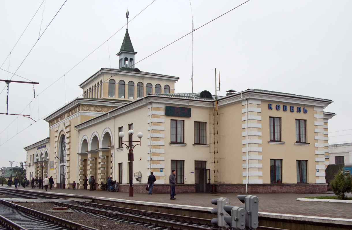 Вокзал станції Ковель